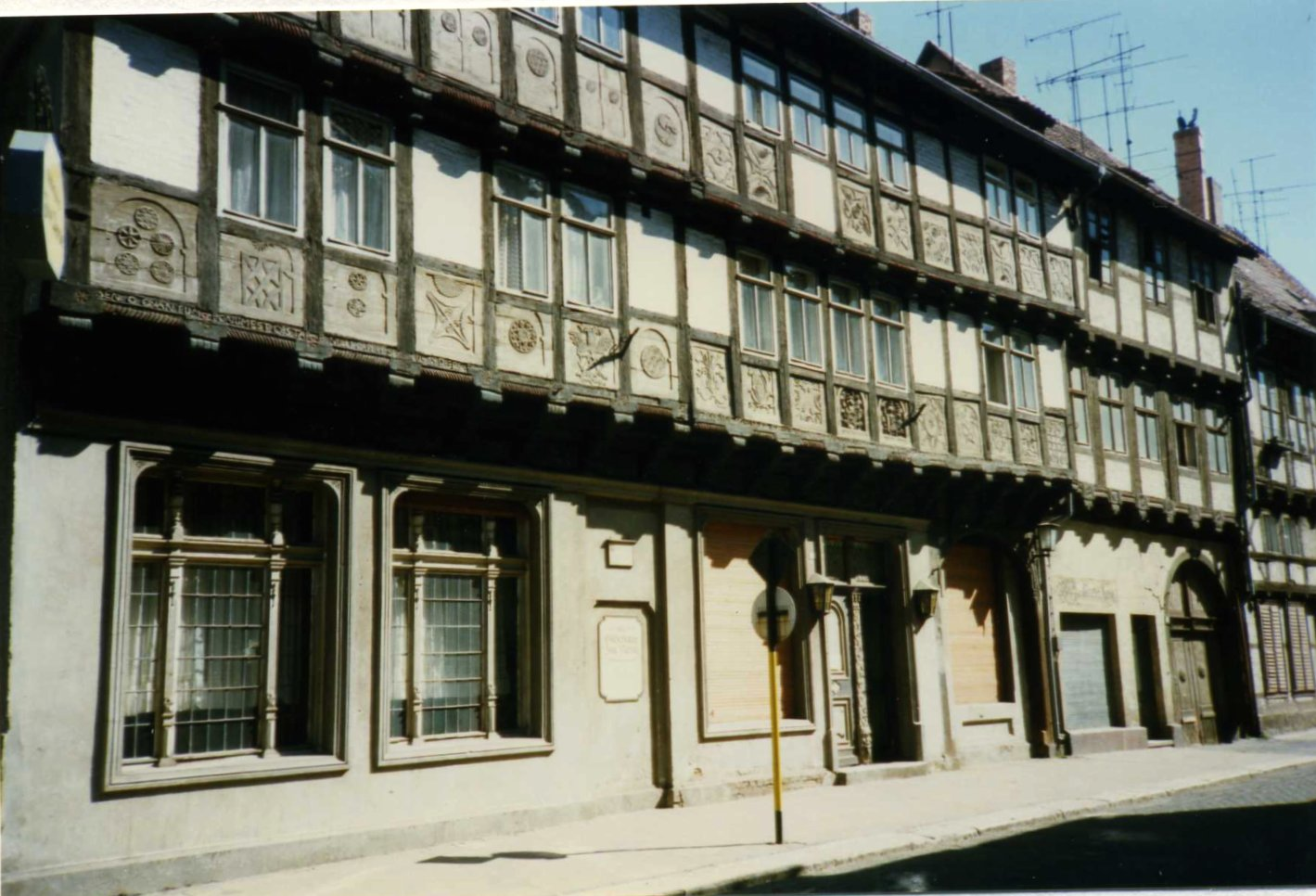 Gildehaus zur Rose, Breite Straße 39, Quedlinburg DDR. Fachwerkhaus of 1612. Much restored since, and painted red.